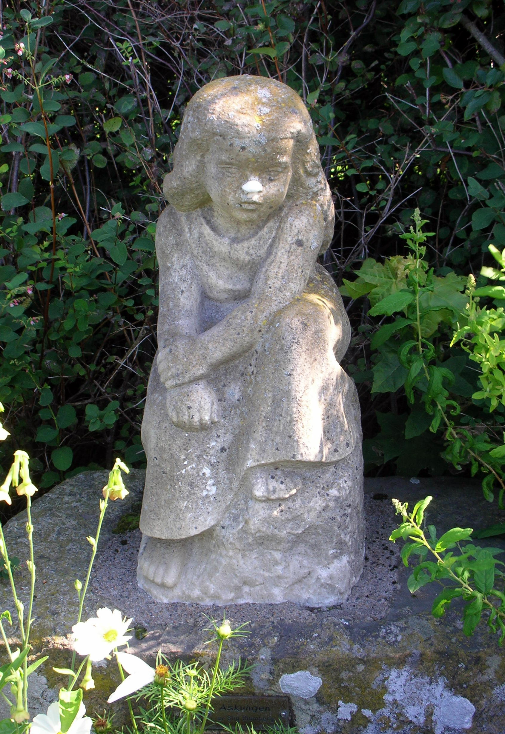 Askungen av Stig Blomberg.